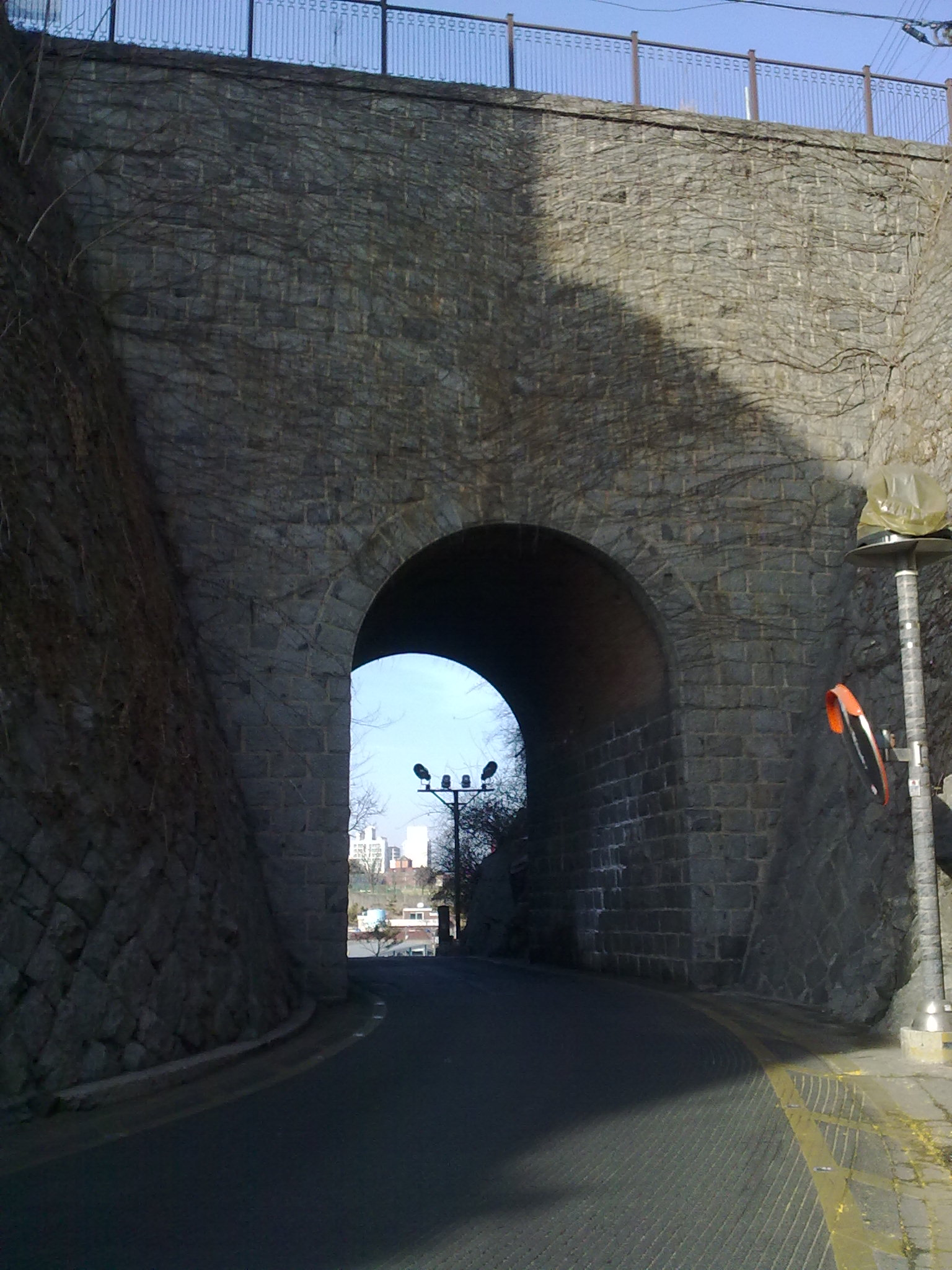 인천 자유공원 홍예문